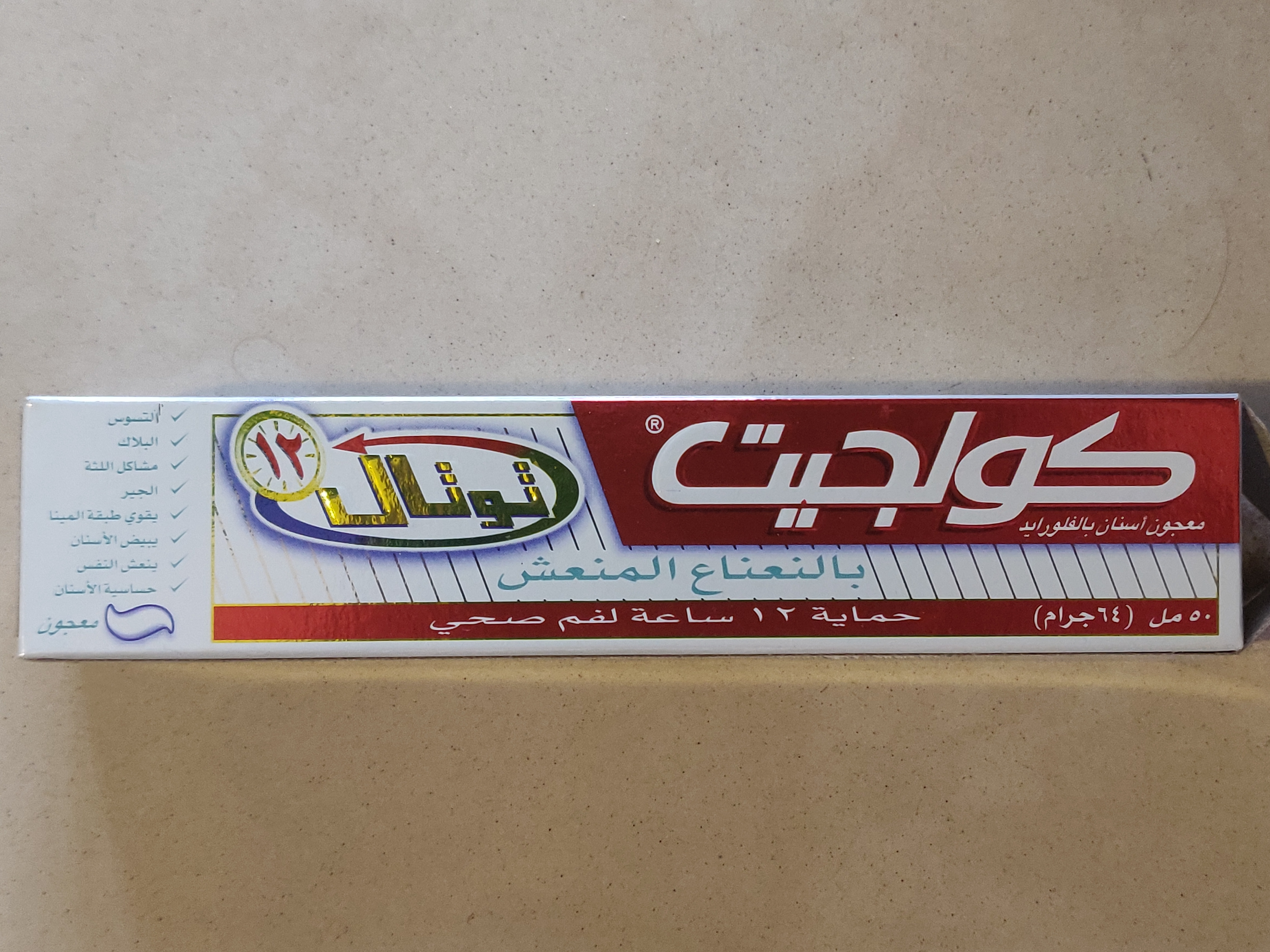 Verpackung einer Colgate-Zahnpasta mit arabischer Beschriftung